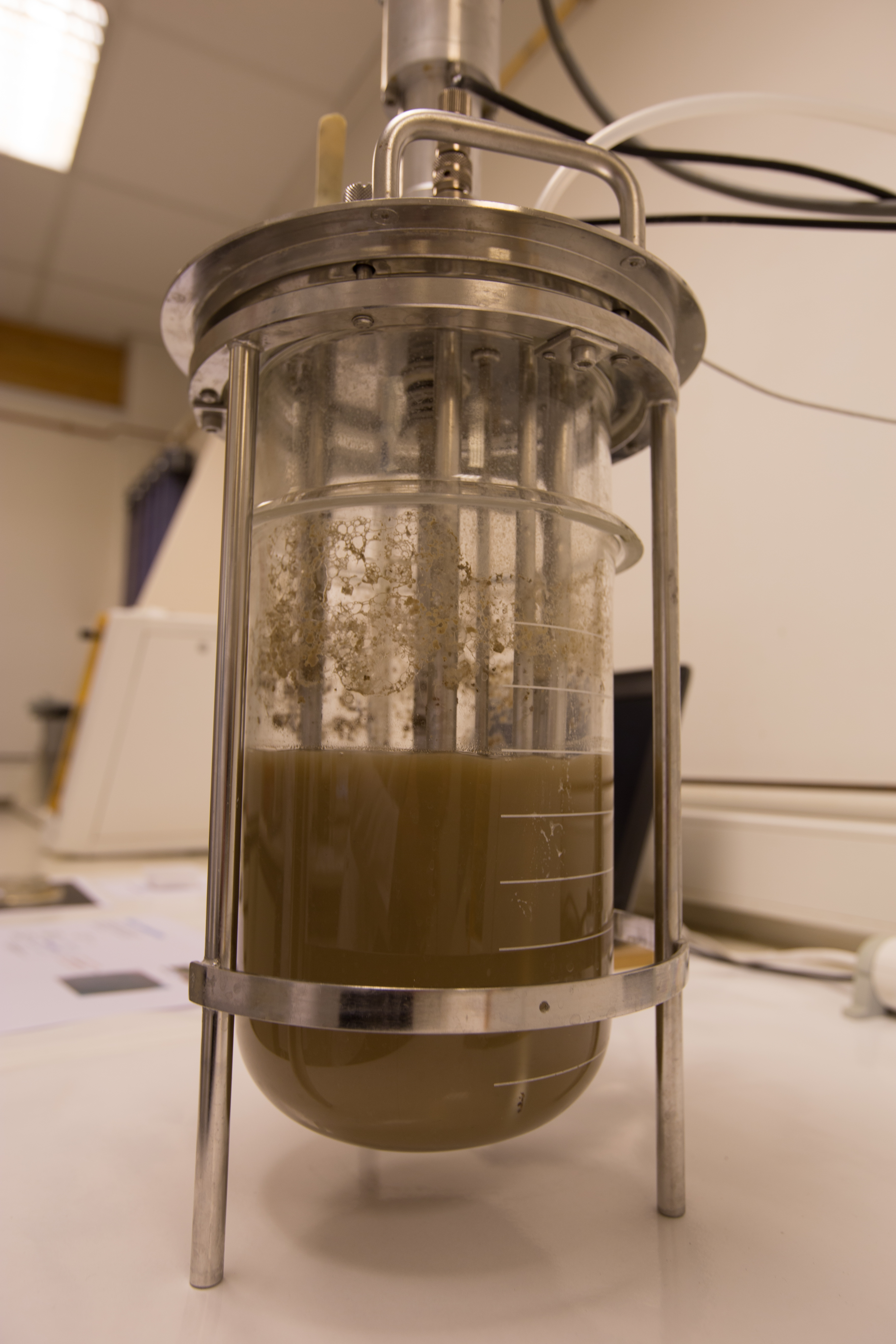 Sporenvormende bacteriën, gekweekt voor toepassing in zelfhelend beton bij biotechbedrijf Avecom, in een bio-fermentor.